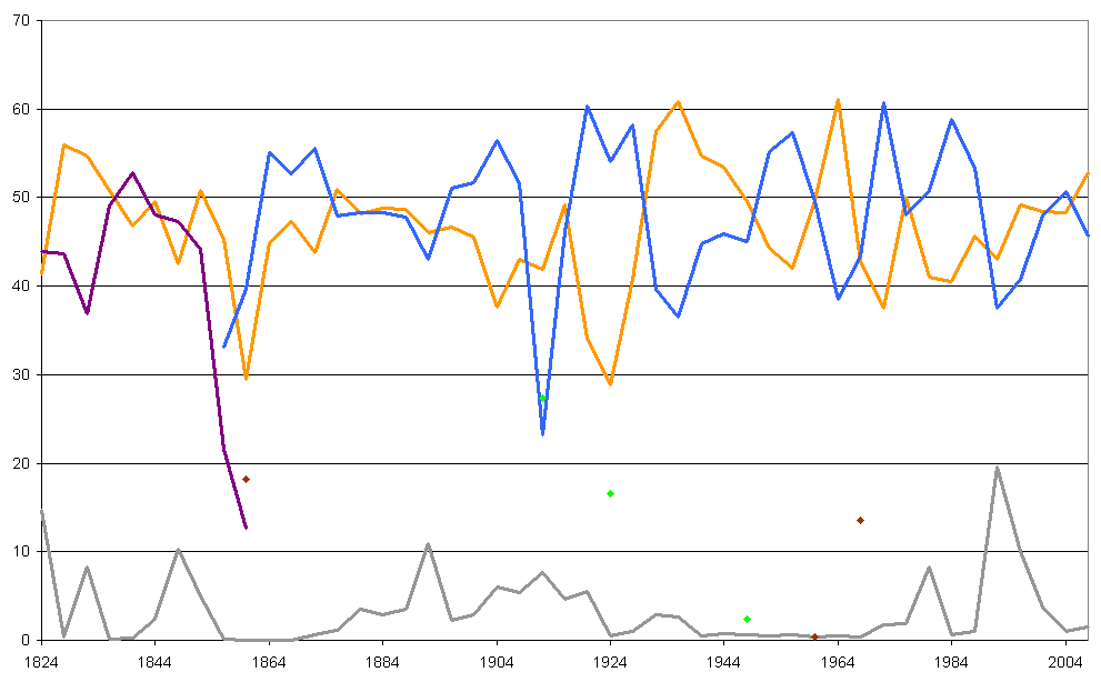 Évolution des différents partis politiques des États-Unis au niveau national depuis 1824 en pourcentage des suffrages exprimés. Jaune: Démocrates Violet: Républicains Nationaux, Whigs, Américains, Union Constitutionnelle Bleu: Républicains (1856-présent) Vert: Progressistes (T. Roosevelt 1912, LaFollette 1924, H. Wallace 1948) Marron: Sudistes (Breckinridge 1860, Thurmond 1948(??), Non-engagés de 1960, G. Wallace ) Gris: autres (dont Populistes, Socialistes, Anderson 1980, Perot 1992… )